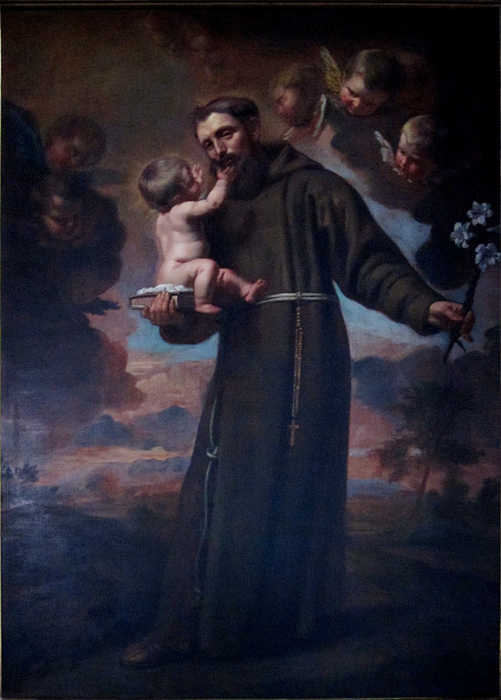 Saint Antoine de Padoue et l'enfant Jésustitle QS:P1476,fr:"Saint Antoine de Padoue et l'enfant Jésus" label QS:Lfr,"Saint Antoine de Padoue et l'enfant Jésus"